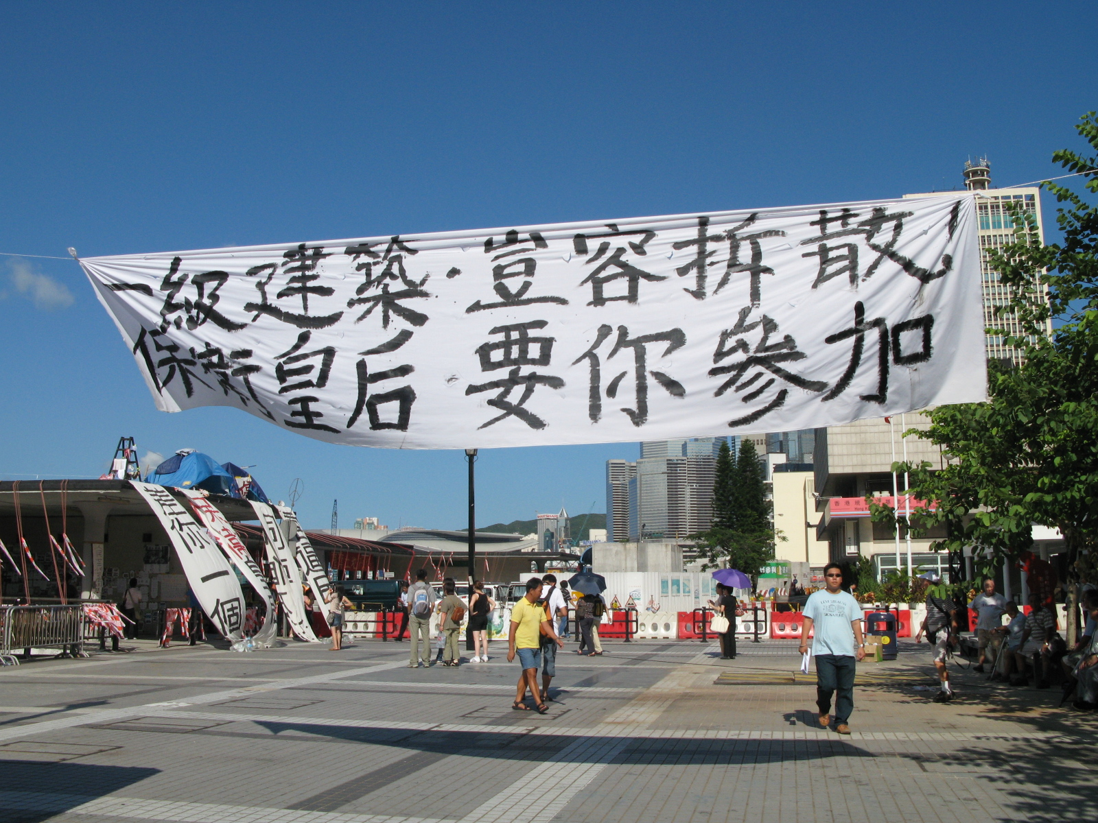 Queen's Pier Last Day Banner